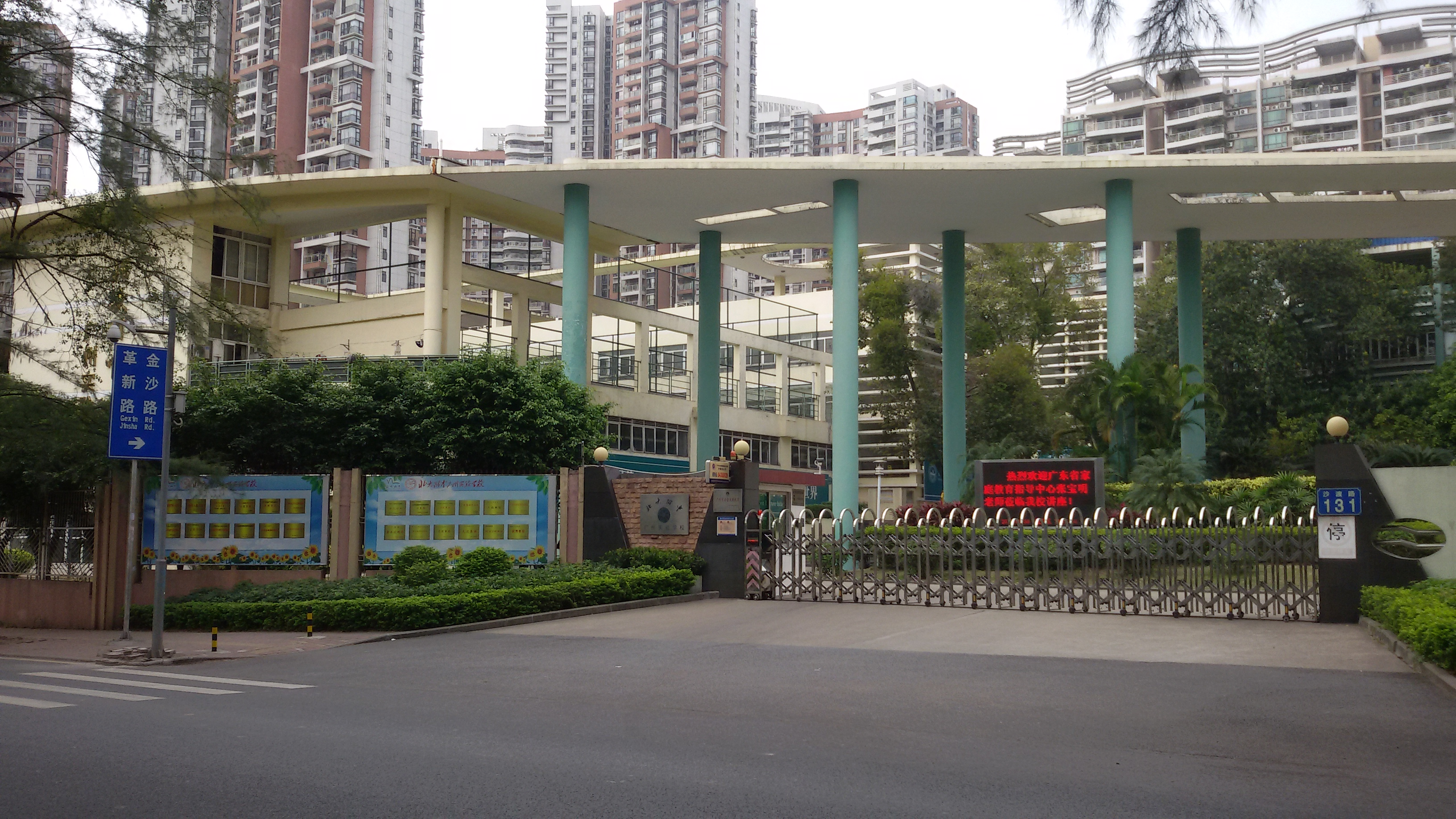 粵語: 北大附中廣州實驗學校嘅光大花園校區南門附近